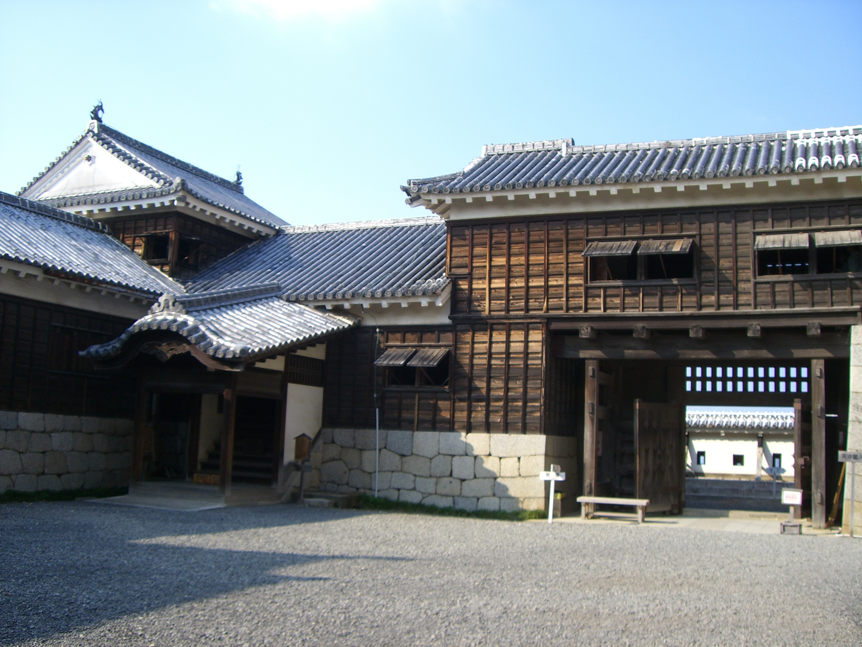 内庭から見た北隅櫓、玄関多聞、内門（松山城本壇）。